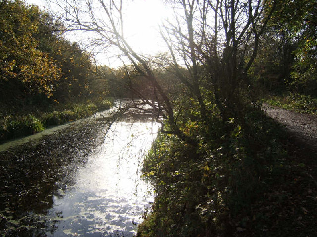 Looking SE.